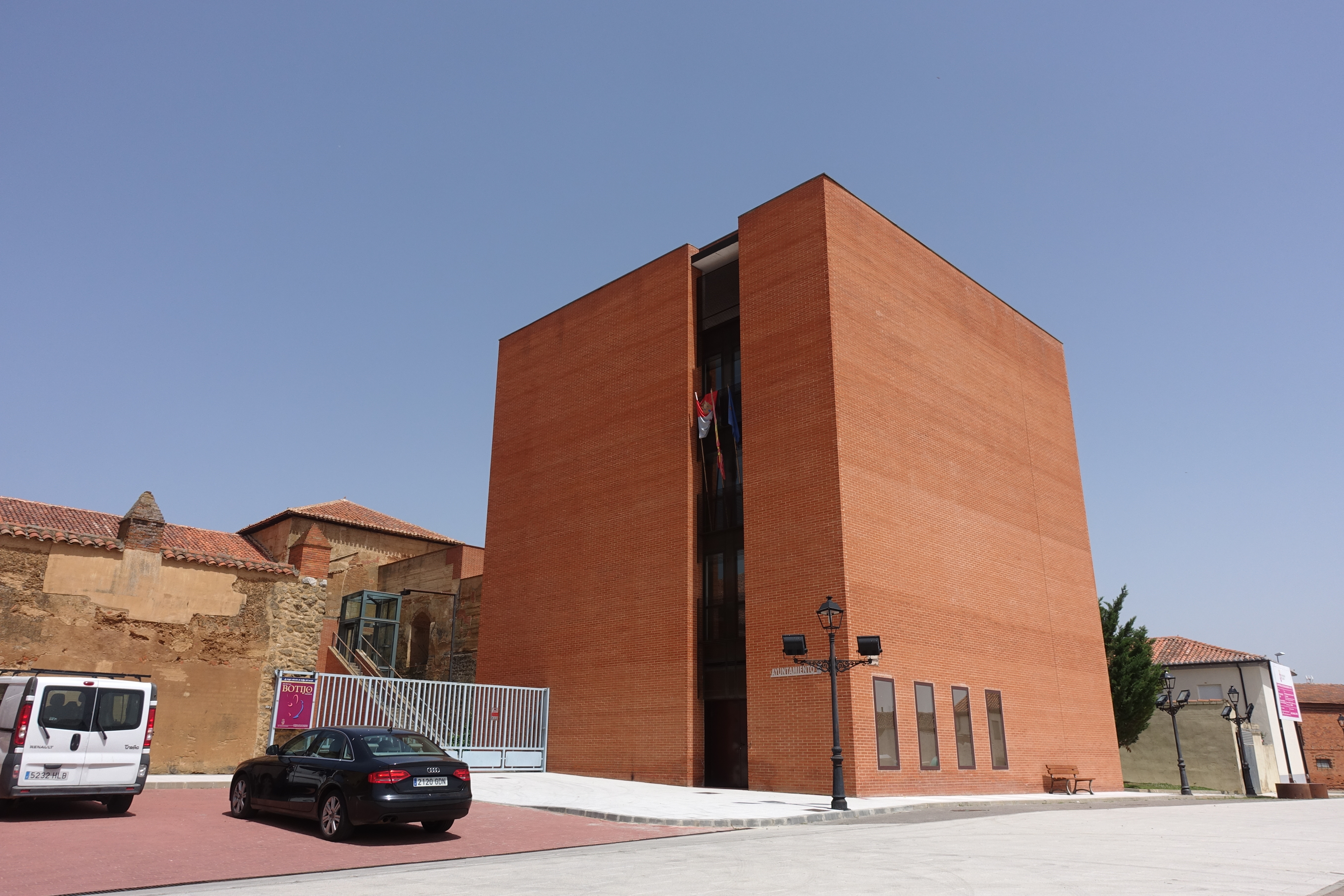 Casa consistorial de Toral de los Guzmanes (León, España).